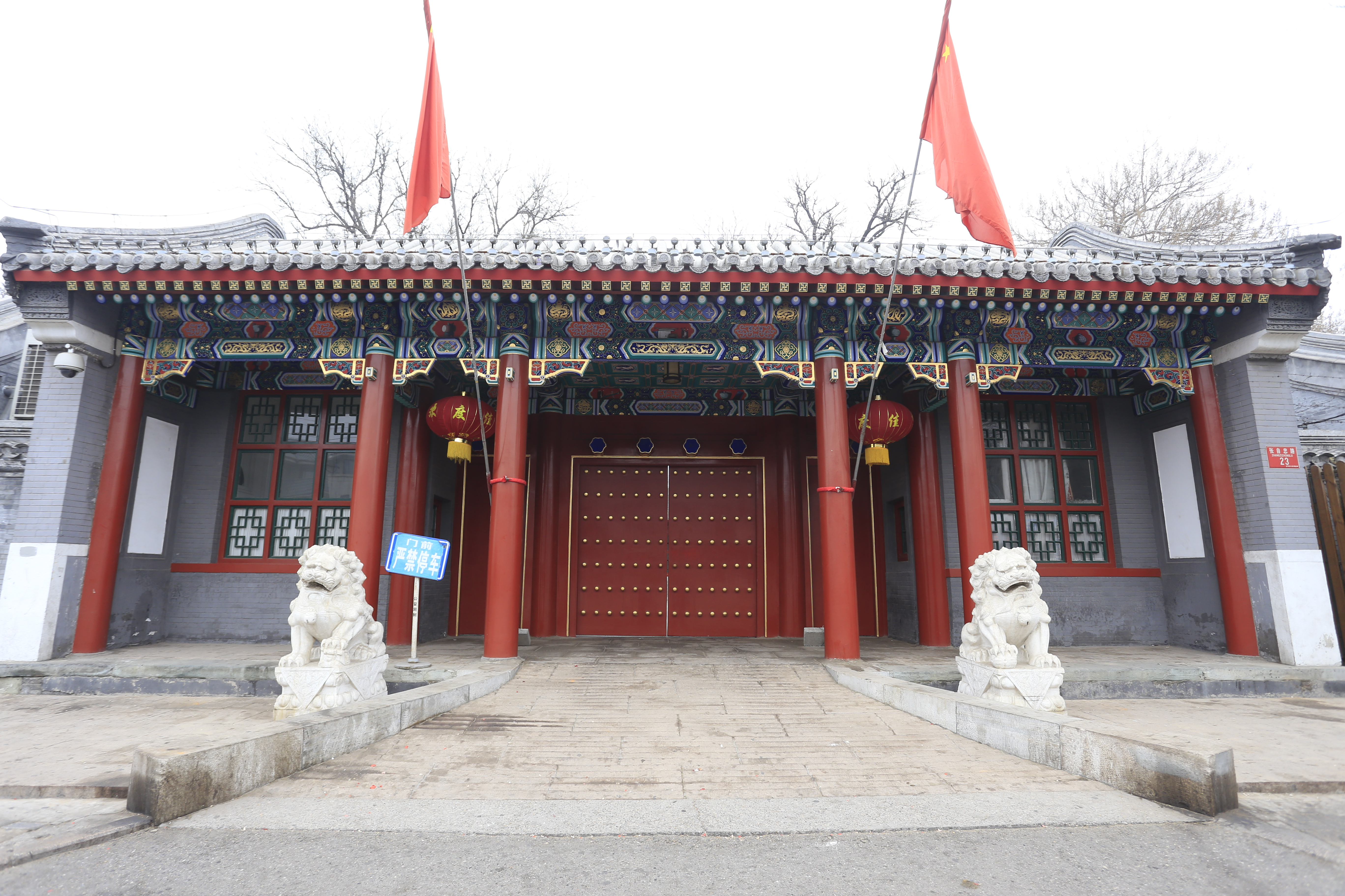 北京孙中山行馆,，位于北京市东城区张自忠路23号